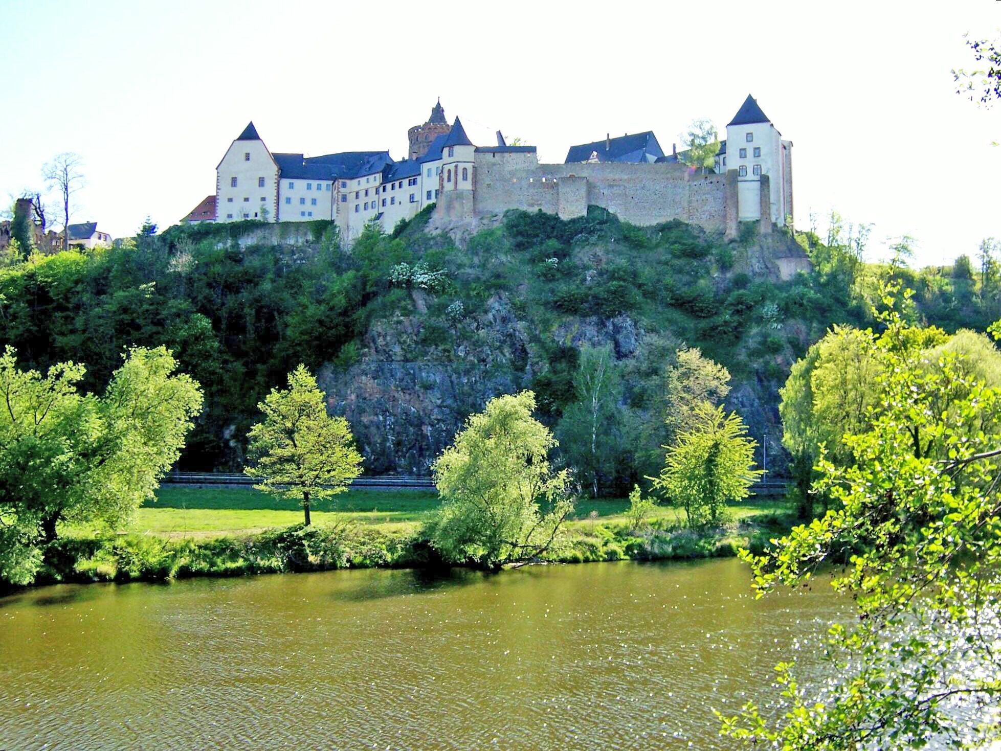 Blick von der Mulde auf Burg Mildenstein in Leisnig, Sachsen eigene Aufnahme vom 1. Mai 2007